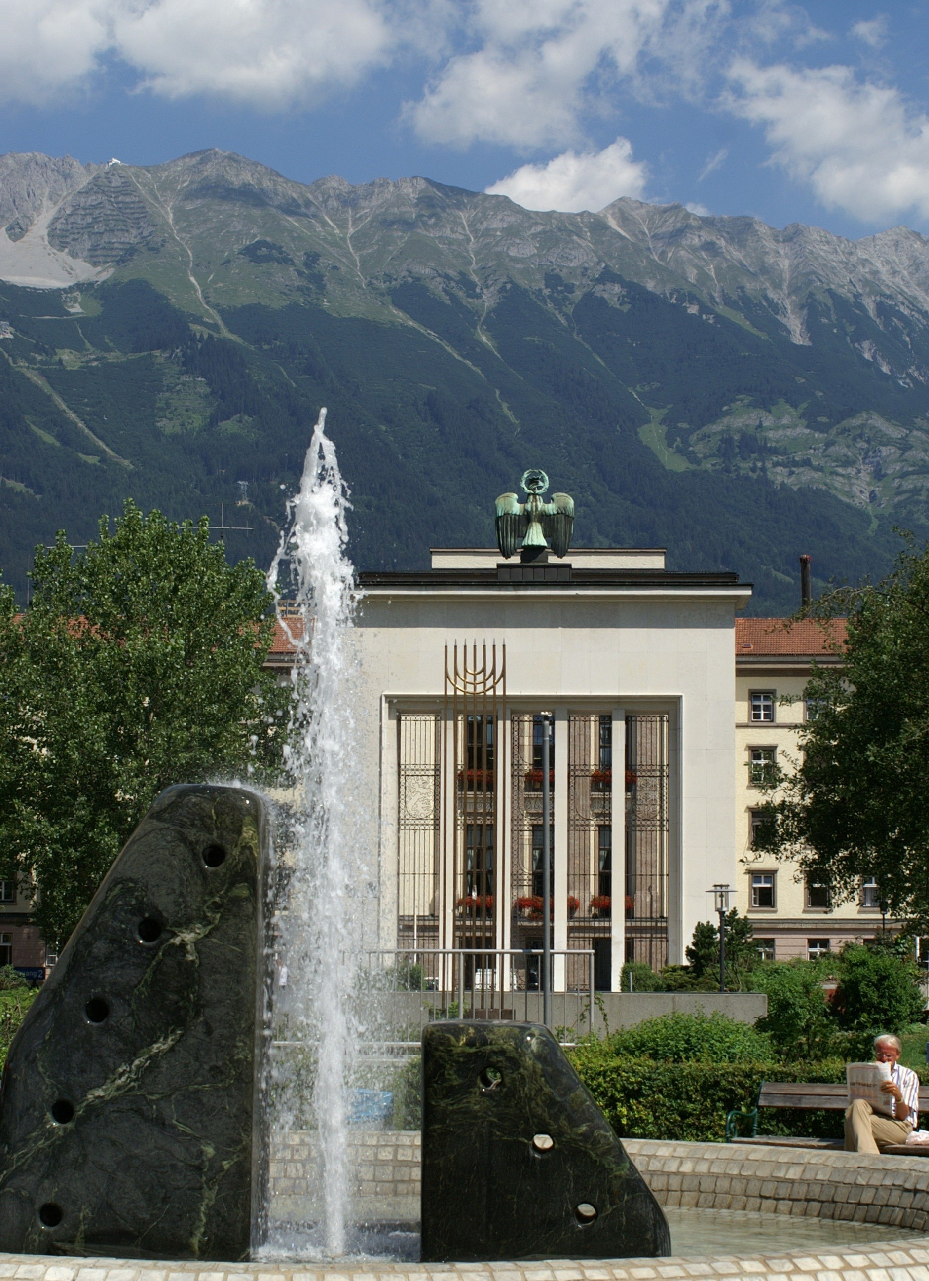 Befreiungsdenkmal (Innsbruck) steht am Eduard-Wallnöfer-Platz 1945